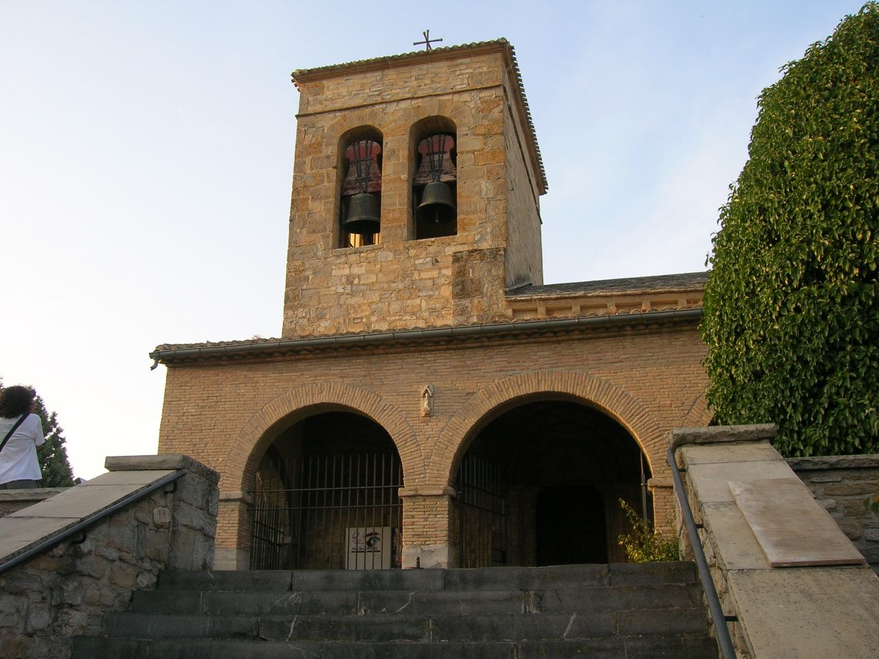 Iglesia de San Emeterio y San Celedonio en Cizur Menor.